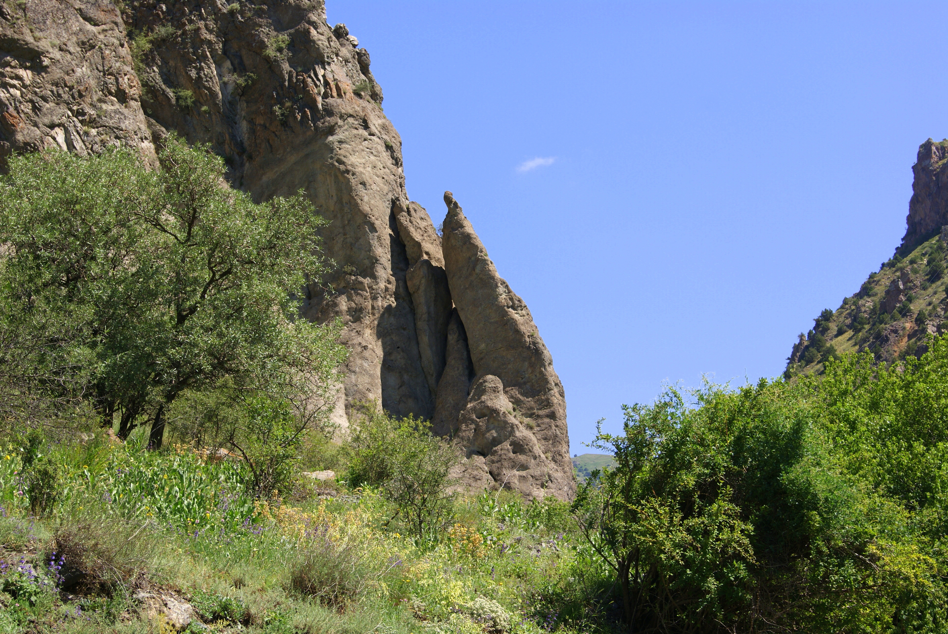 «Անանուն» դայկա